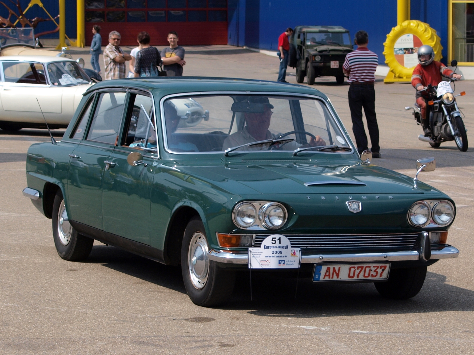 Photographed at the Technik museum Sinsheim, Germany. Participating in the Kurpfalz-Klassik rund um die 1. Tankstelle der Welt.